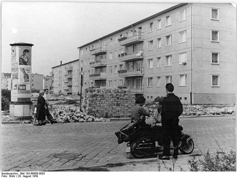 Berlin, Stralauer Allee, Neubauten, Wohnblocks, Litfassäule Zentralbild Stöhr 20.8.1959 Zum 10. Jahrestag der DDR Stadtansichten von Berlin-Neubauten In Berlin entstanden in den letzten 10 Jahren viele neue Wohnkomplexe und Neubauten. Weiter wurden viele Altbauten neu verputzt, um so das Gesicht Berlins zu verschönern. UBz: Neubauten in der Stralauer Allee, die in der Großblockbauweise hergestellt wurden.